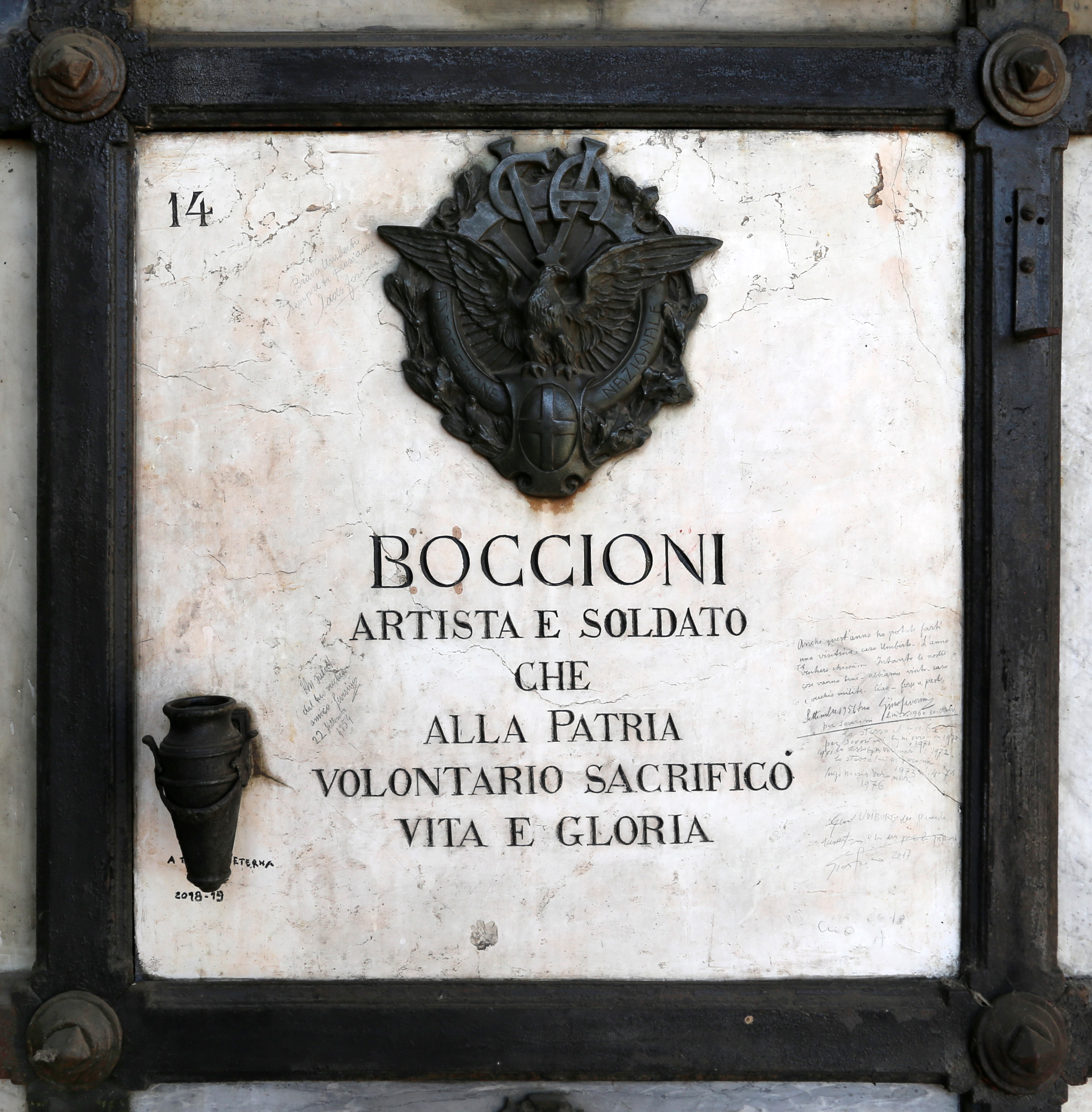 cimitero monumentale di Verona This is a photo of a monument which is part of cultural heritage of Italy.